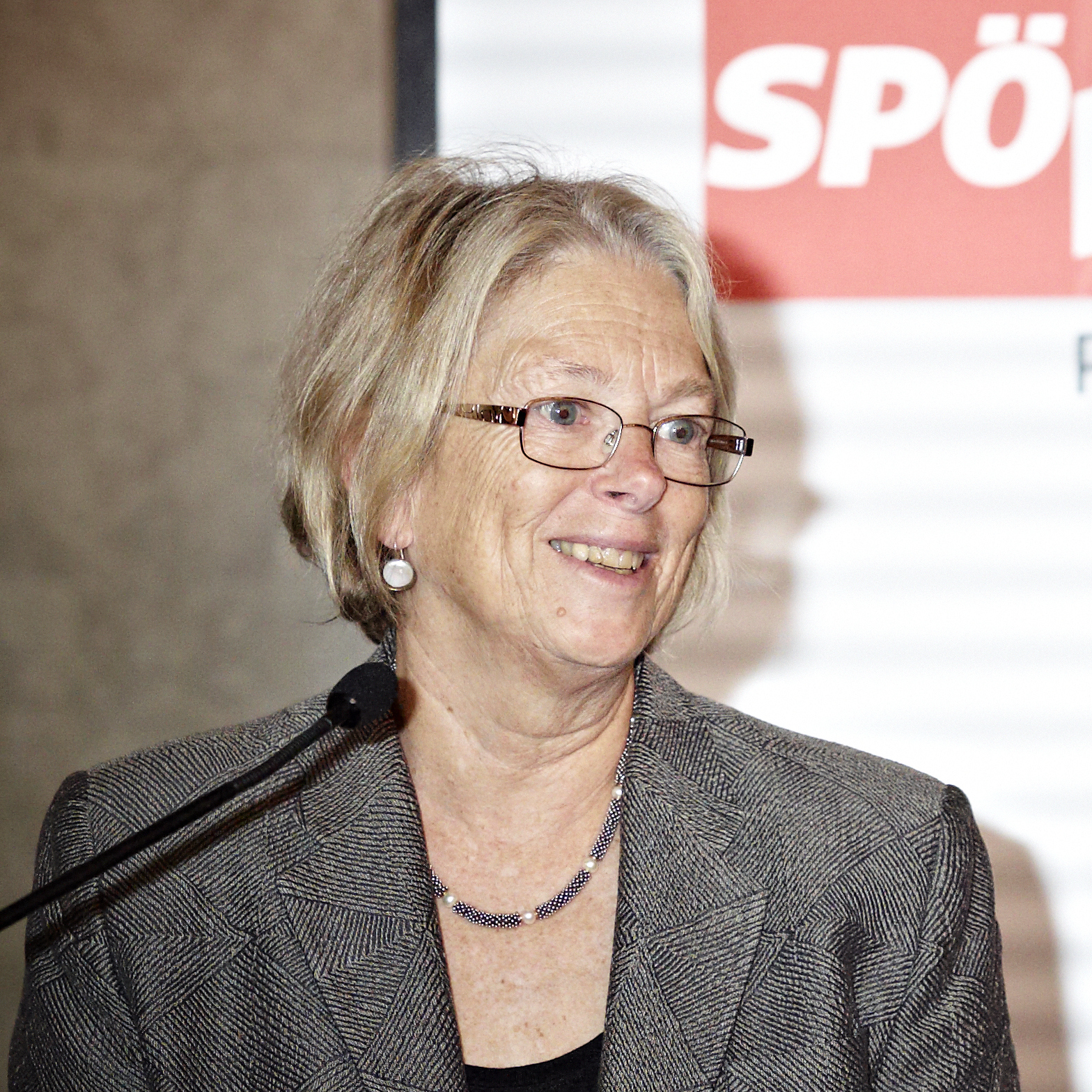 Festvortrag und Diskussion: „Das Recht auf Wissen“ mit Pamela Samuelson